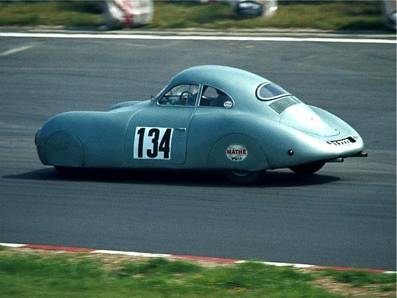 Berlin-Rom-Wagen VW Typ 60 K 10 bzw. Porsche Type 64 bei einer Demonstrationsfahrt zum AvD-Oldtimer-Grand-Prix auf dem Nürburgring, am Ende der Gegengeraden. Der Fahrer ist wahrscheinlich der Eigentümer des Wagens, Otto Mathé.